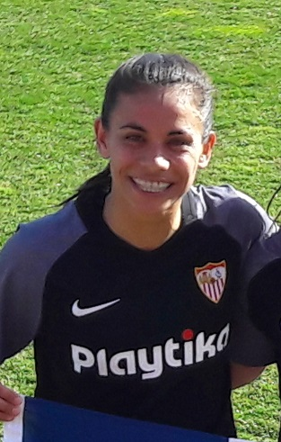 Francisca Lara el 9 de febrero de 2019